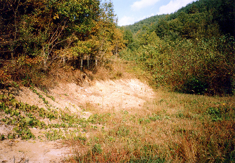 사적 제71호 성산사부동도요지 (星山沙鳧洞陶窯址)